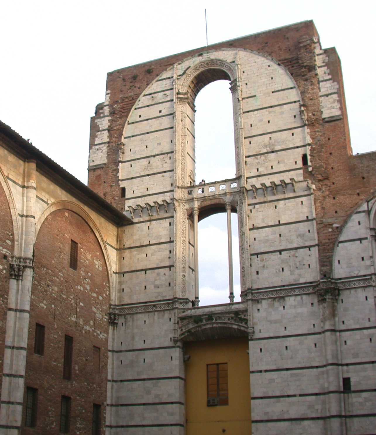 Italia, Siena, facciata incompiuta dell'ingrandimento del Duomo ("Facciatone"), lato interno